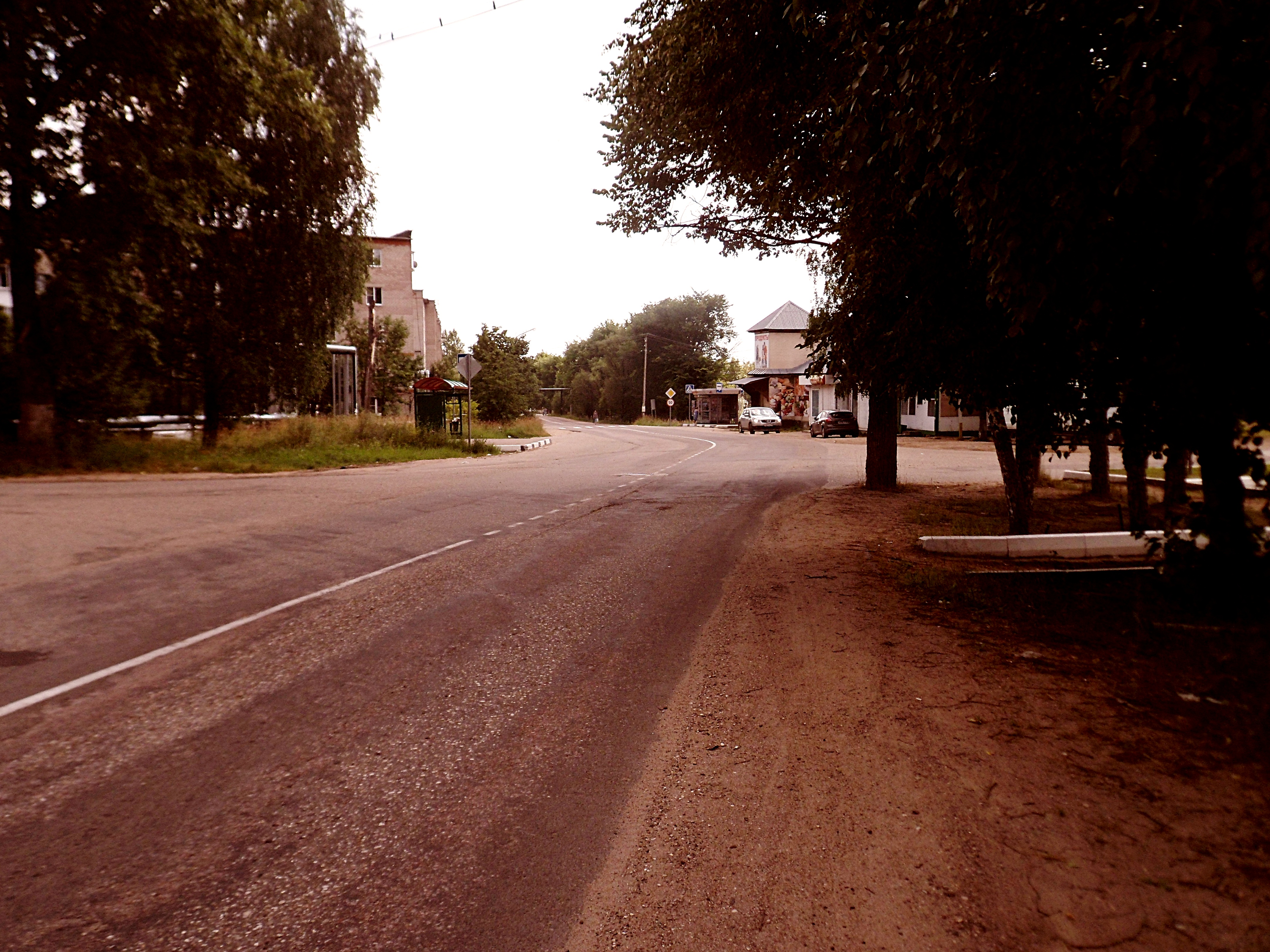 Улица Виксне в Дорохово. Рузский район, МО.